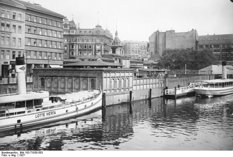 Berlin, Flussbad Pochhammer ADN-ZB, Berlin Das Flußbad Pochhammer, gelegen zwischen Waisenbrücke und Jannowitzbrücke (Aufn. 1927) [Berlin.- Schwimmschule / Flussbad Pochhammer an der Spree, im Vordergrund Dampfer "Lotte Herta"]